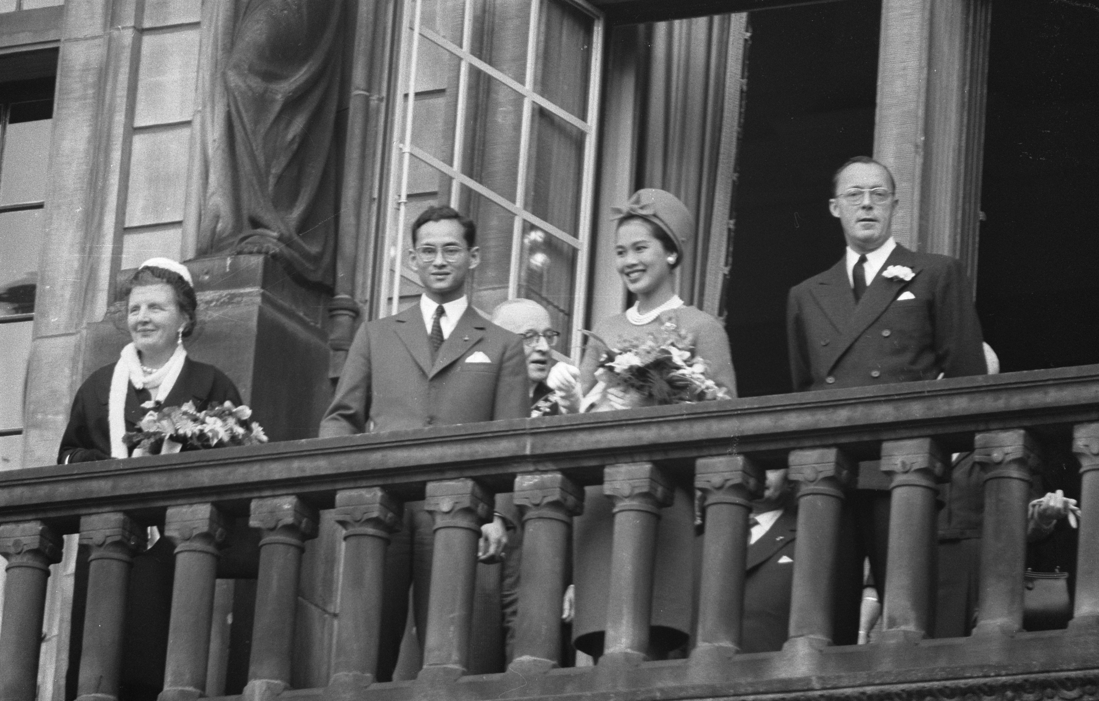 Collectie / Archief : Fotocollectie Anefo Reportage / Serie : [ onbekend ] Beschrijving : Koningspaar van Thailand bezoekt Rotterdam, het koninklij gezelschap op het balkon voor het stadhuis Datum : 25 oktober 1960 Locatie : Rotterdam, Thailand Trefwoorden : balkons, gezelschappen, koningsparen, stadhuizen Fotograaf : Rossem, Wim van / Anefo Auteursrechthebbende : Nationaal Archief Materiaalsoort : Negatief (zwart/wit) Nummer archiefinventaris : bekijk toegang 2.24.01.05 Bestanddeelnummer : 911-7012